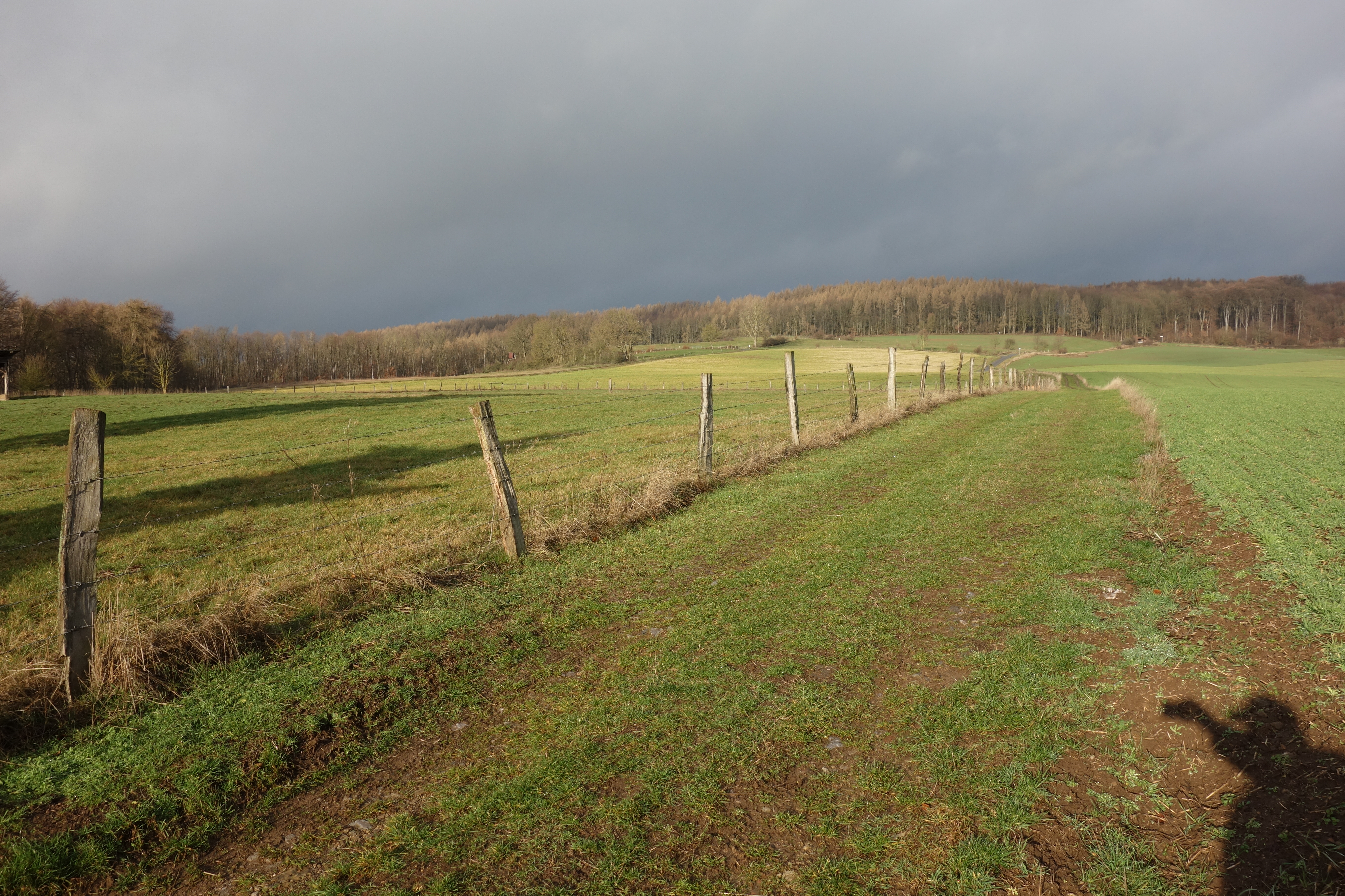 Landschaftsschutzgebiet Heidepost / Steintwisten und Niedernfeld östliche Teilfläche von südlichen Rand aufgenommen, wobei Wald im Hintergrund zum Landschaftsschutzgebiet Randhöhen zwischen Sintfeld und Diemeltal gehört.